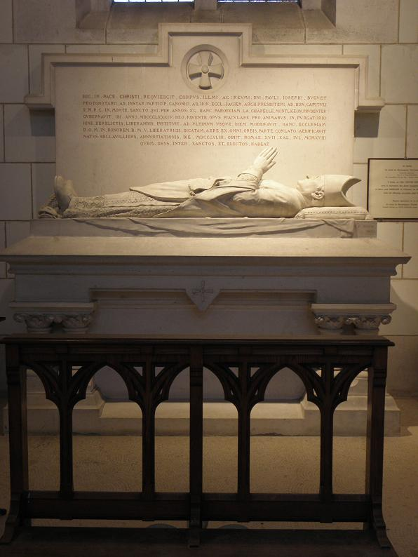 Tombeau de Mgr Paul Buguet en la basilique de La CHapelle-Montligeon (61).